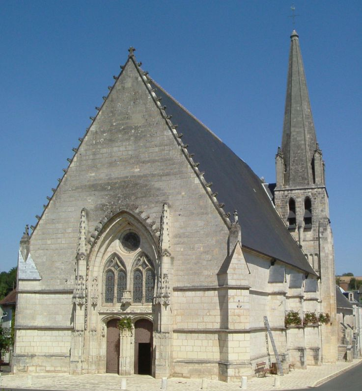 église Saint Martin de Lunay, Loir-et-Cher. Construction du XIIe siècle, avec des éléments remaniés ultérieurement. Le clocher est du XIIe siècle. Présence à l'intérieur de fresques du XIVe siècle. Photographie prise par l'utilisateur Utilisateur:Tybald2000 le 25 août 2003 Utilisateur:Tybald2000 le 25 août 2003